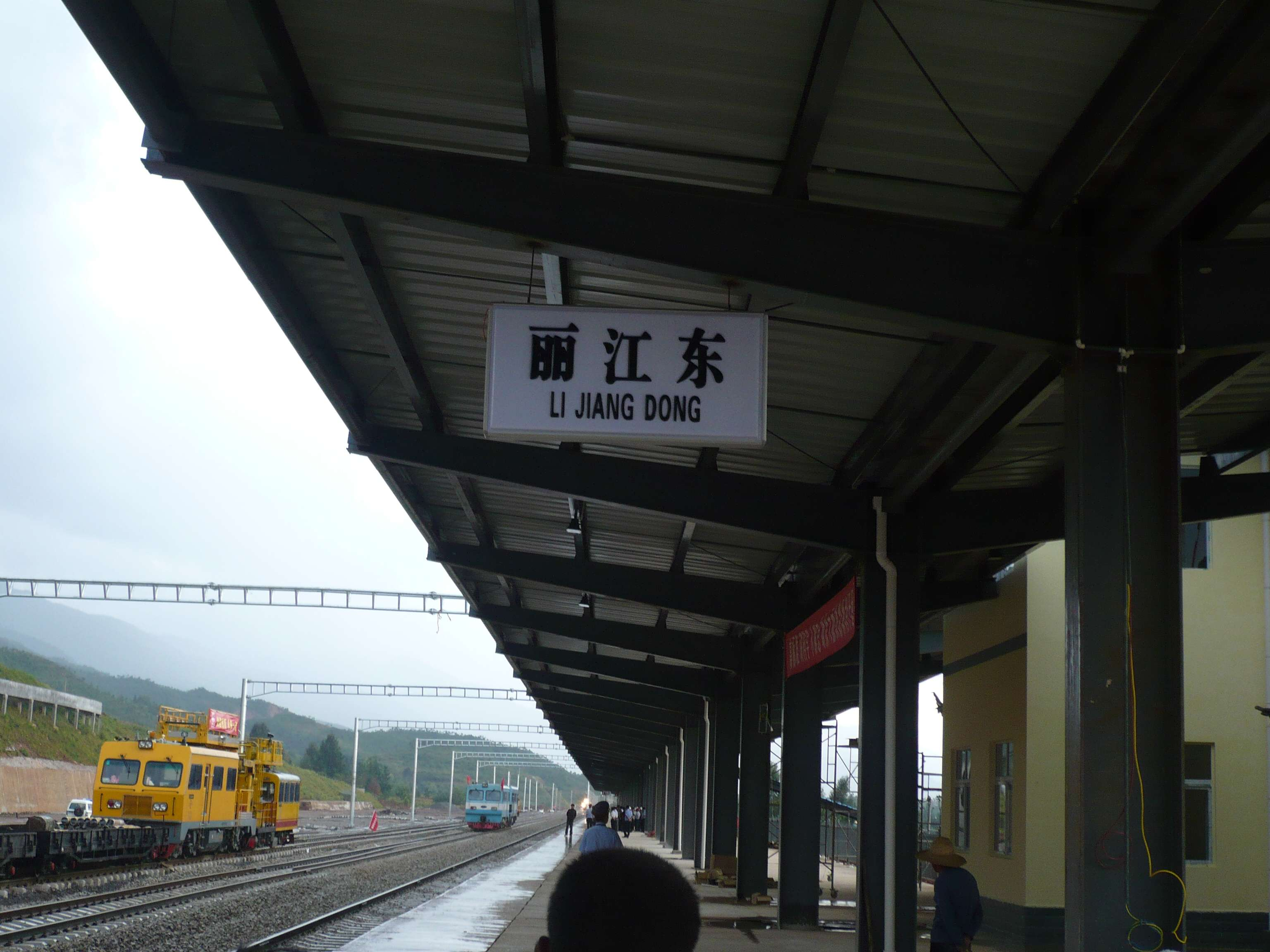 丽江东火车站